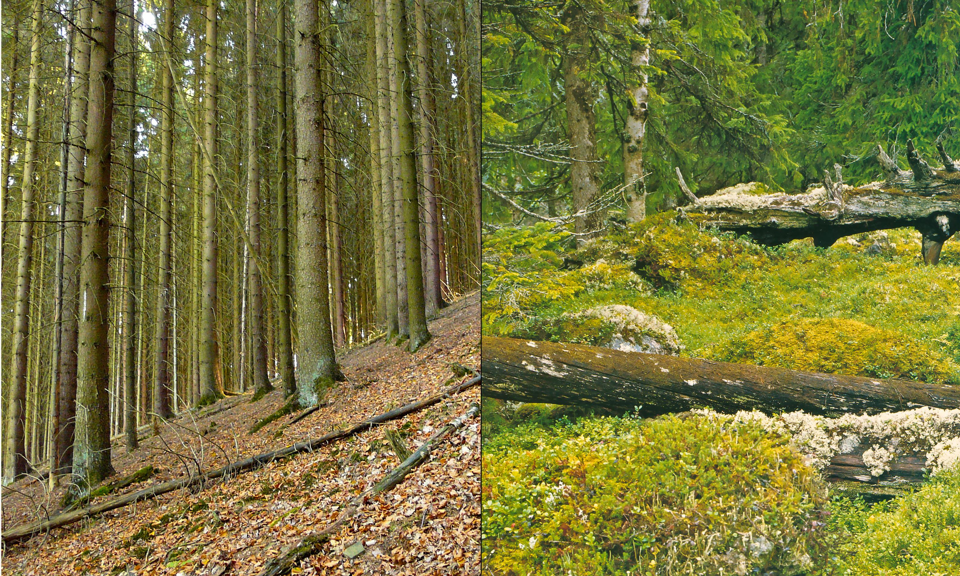 Vergleich einer Fichten-Monokultur aus Deutschland und einem Fichtentaiga-Altwald aus Schweden